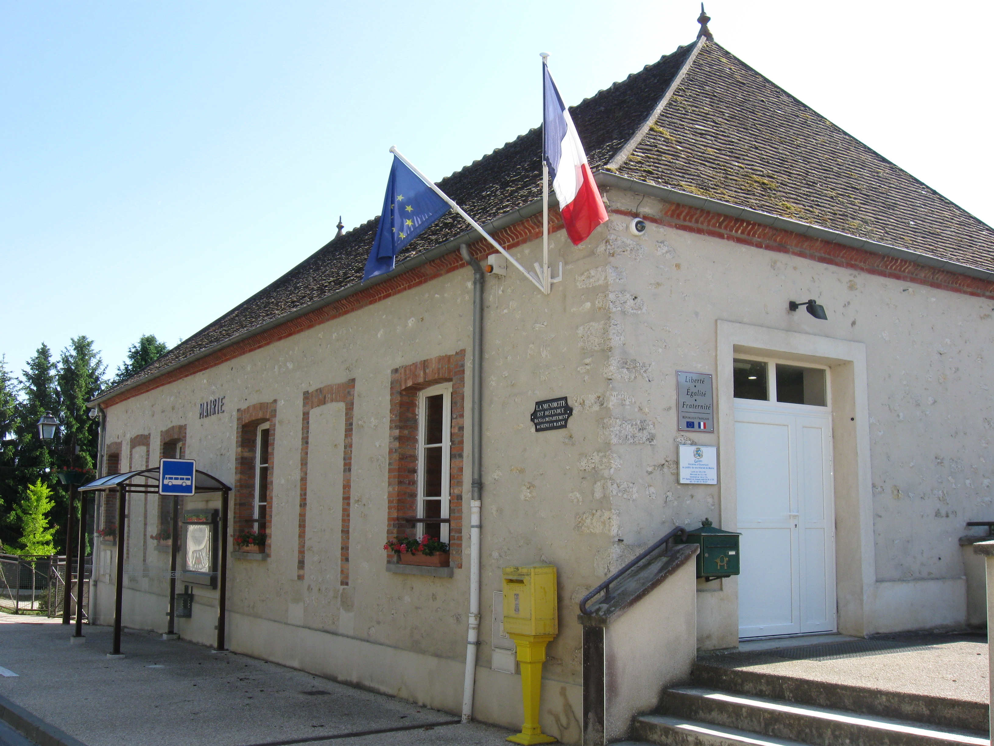 Mairie de Chalmaison. (Seine-et-Marne, région Île-de-France).